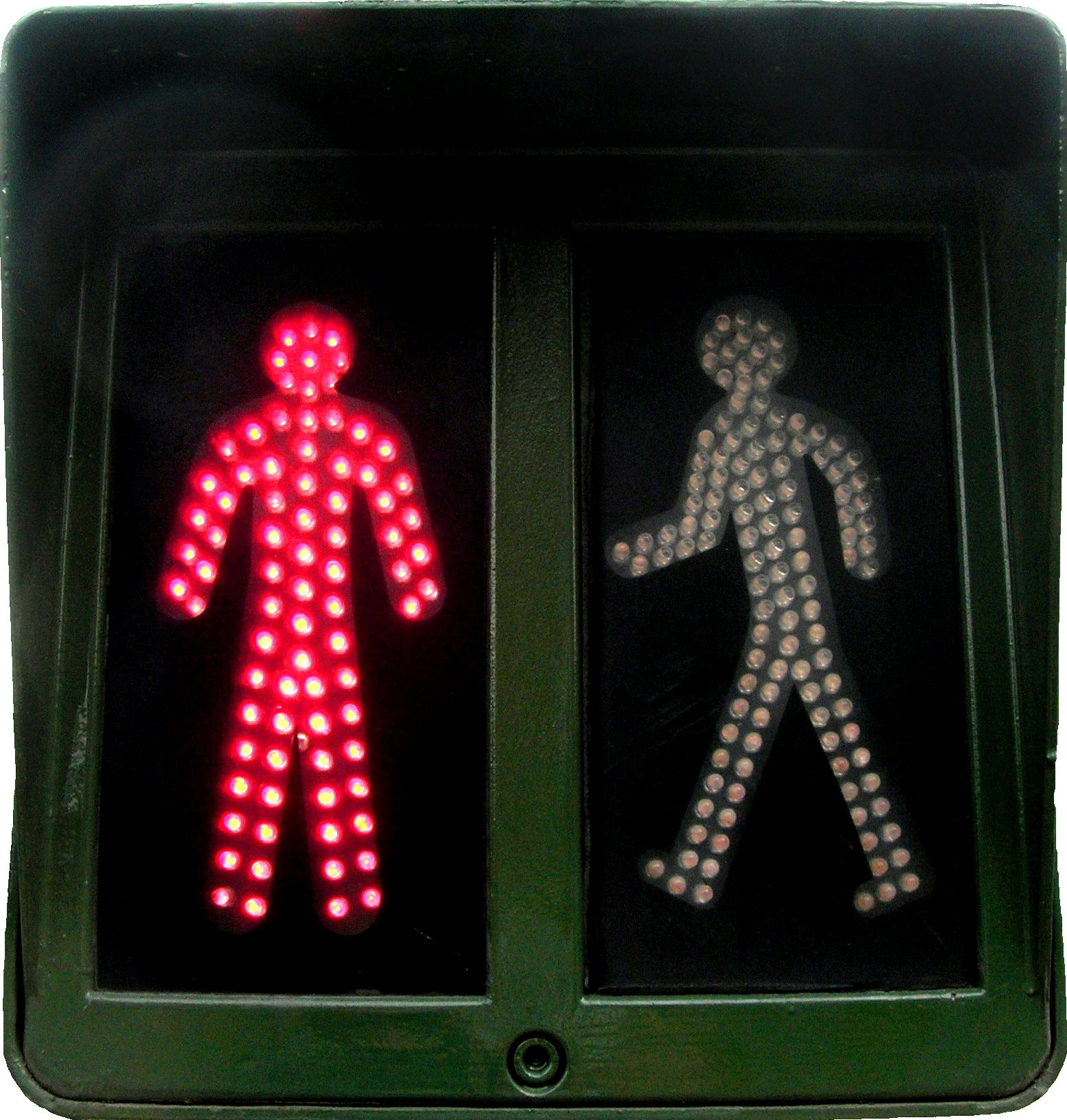 Feux avertissant un piéton s'il peut ou non traverser la route.